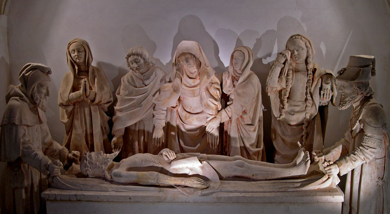 Priorat de Carennac. Enterrament de Crist. Òlt, França